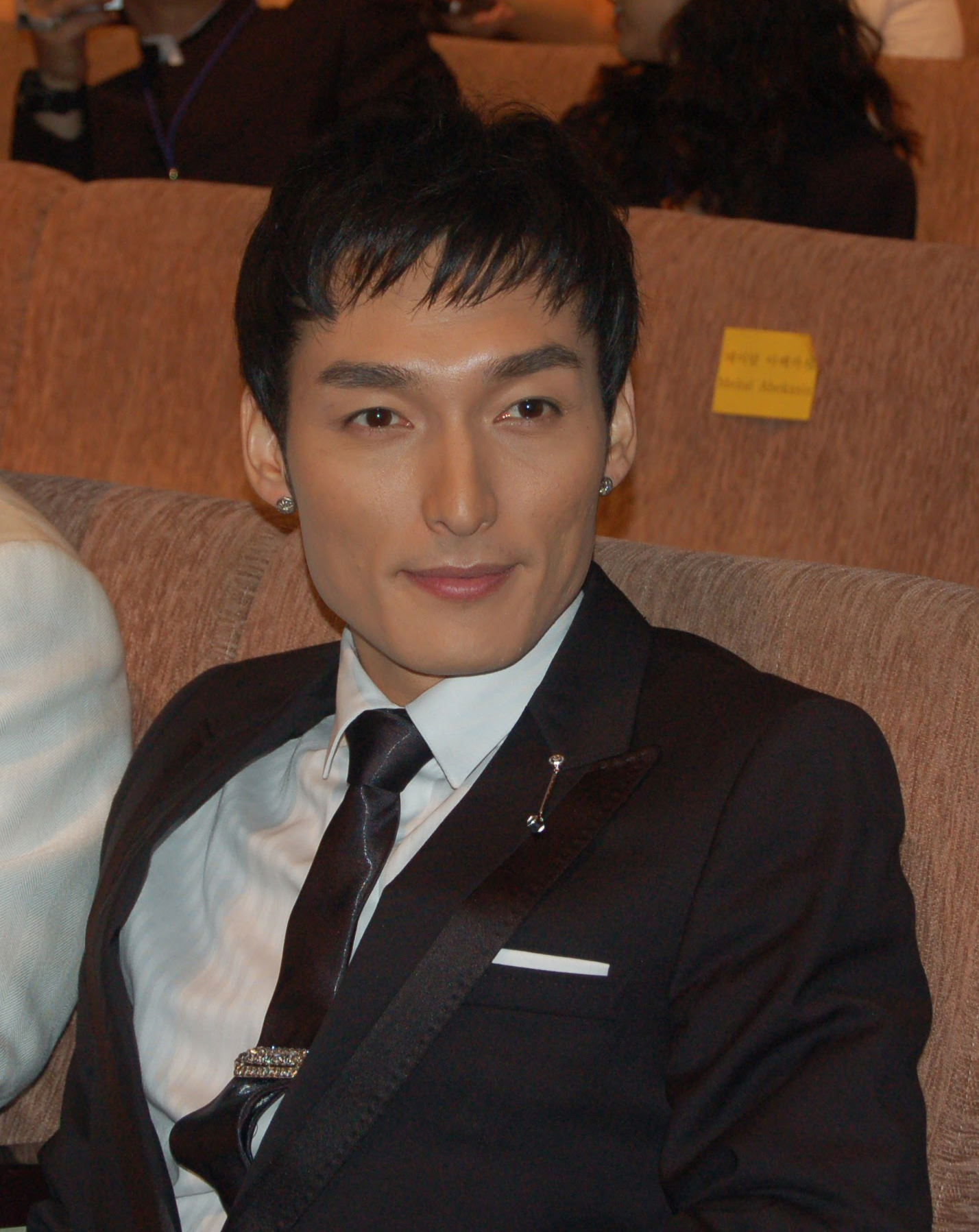 2006.08.29.서울드라마어워드에 참석한 쿠사나기 츠요시